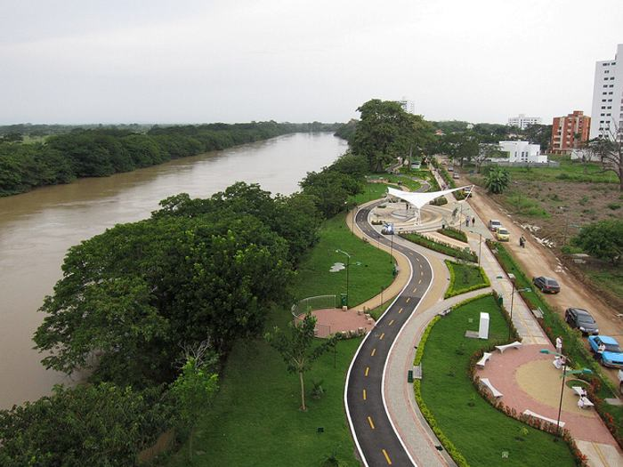 Esta fotografía fue tomada en un área protegida de Colombia con el código 23001 del RUNAP.